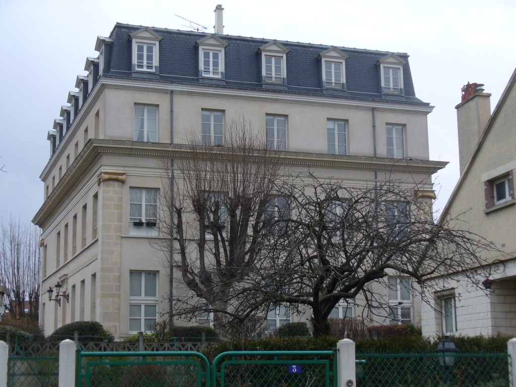 Villa de la princesse Mathilde Saint-Gratien (95)